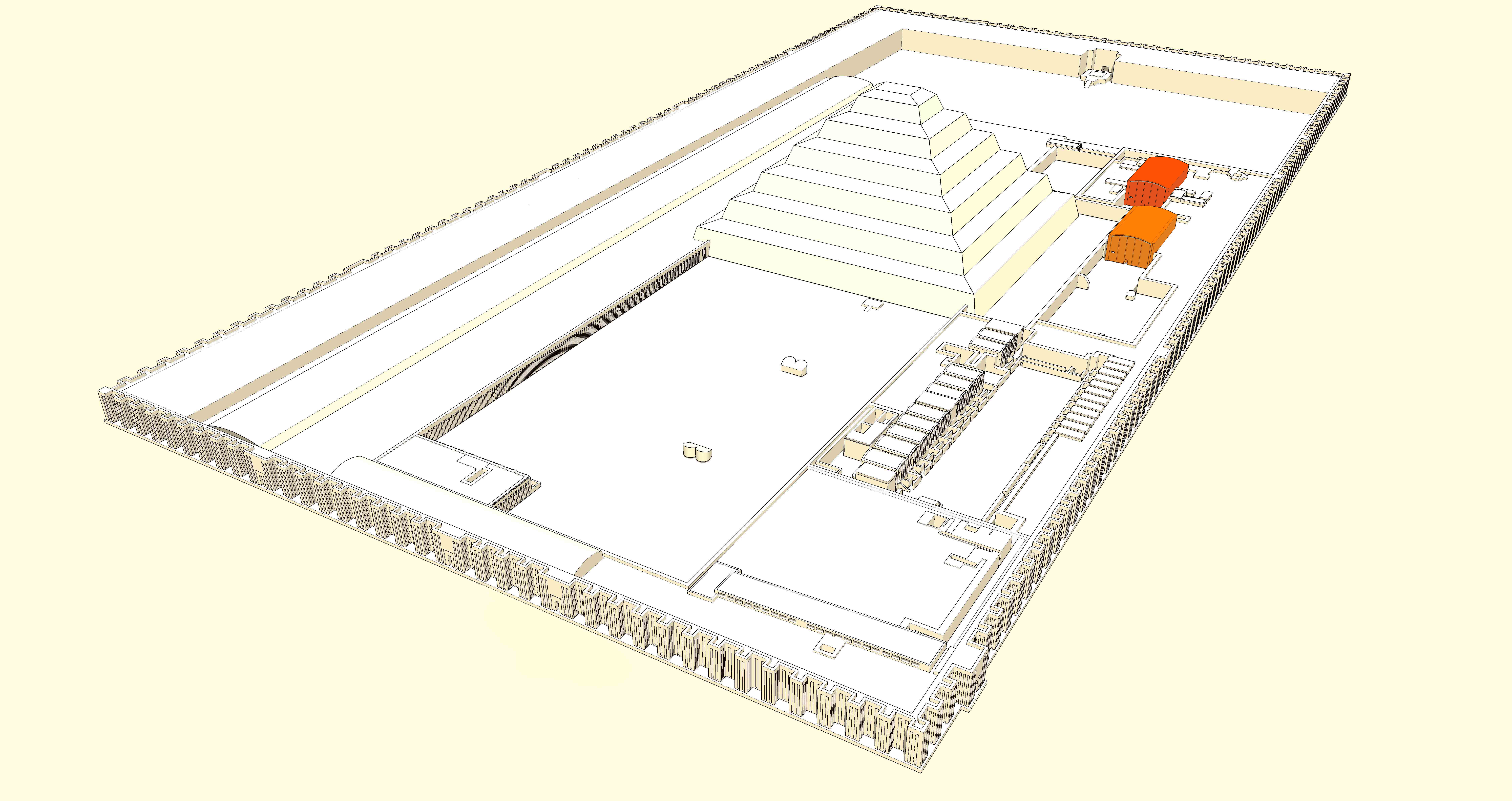 Position du pavillon sud et du pavillon nord dans le complexe funéraire de Djoser